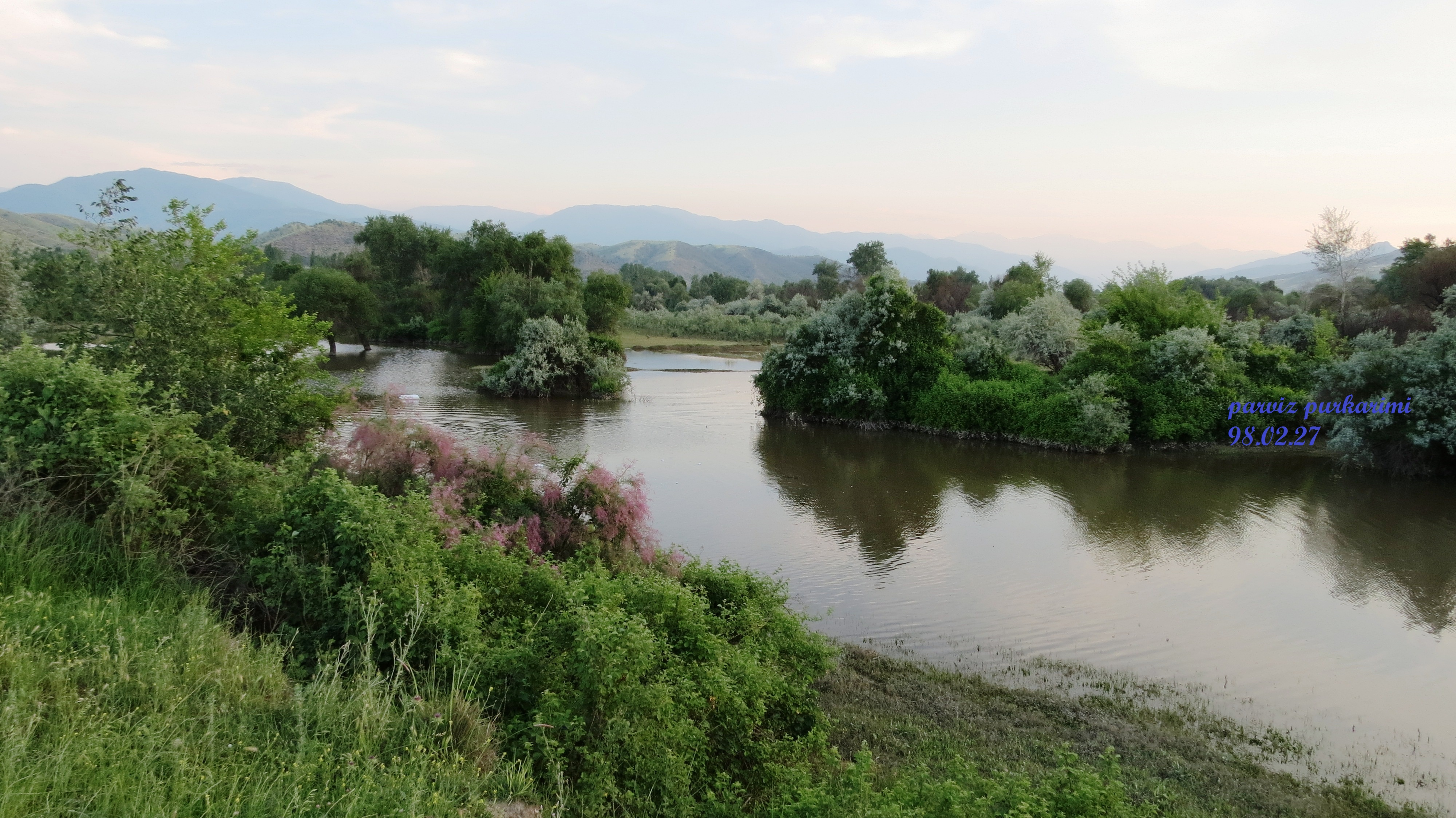 دریاچه طبیعی مابین رود ارس و شهر عاشقلو